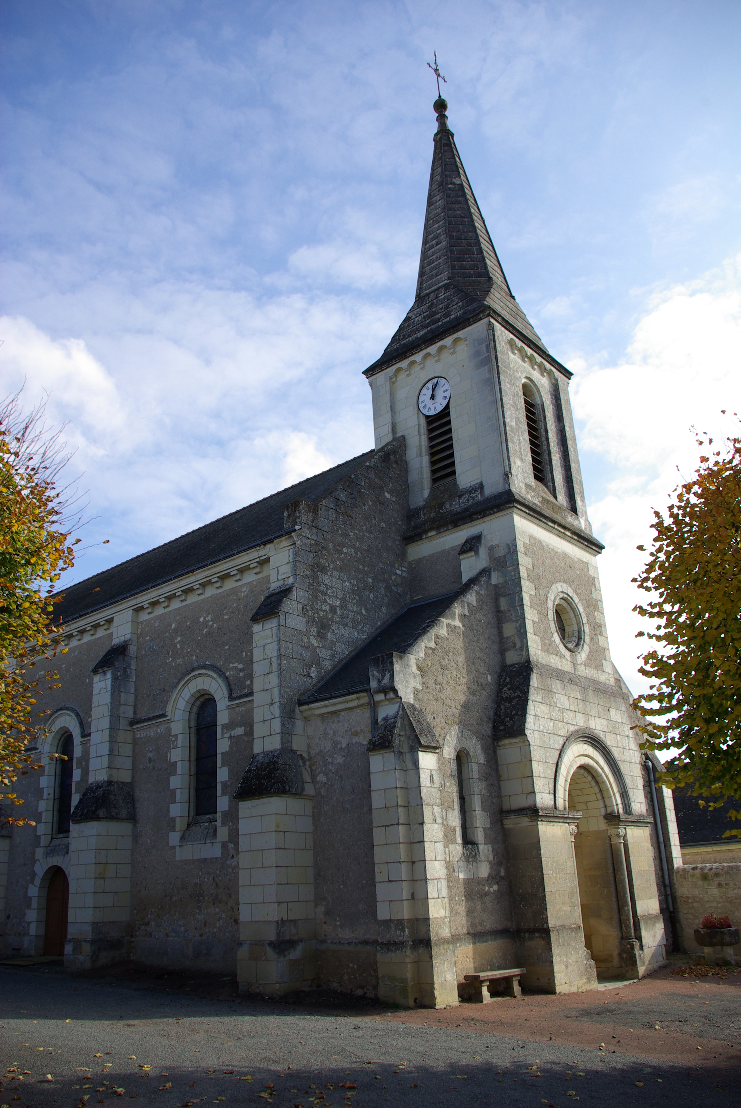 Church of Saint-Michel-sur-Loire (France) Église de Saint-Michel-sur-Loire (France)